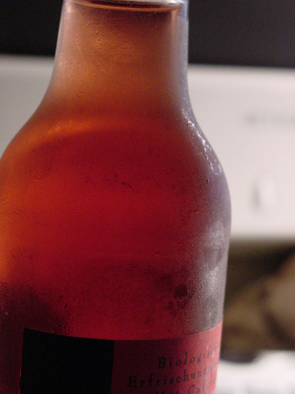 Flasche Bionade